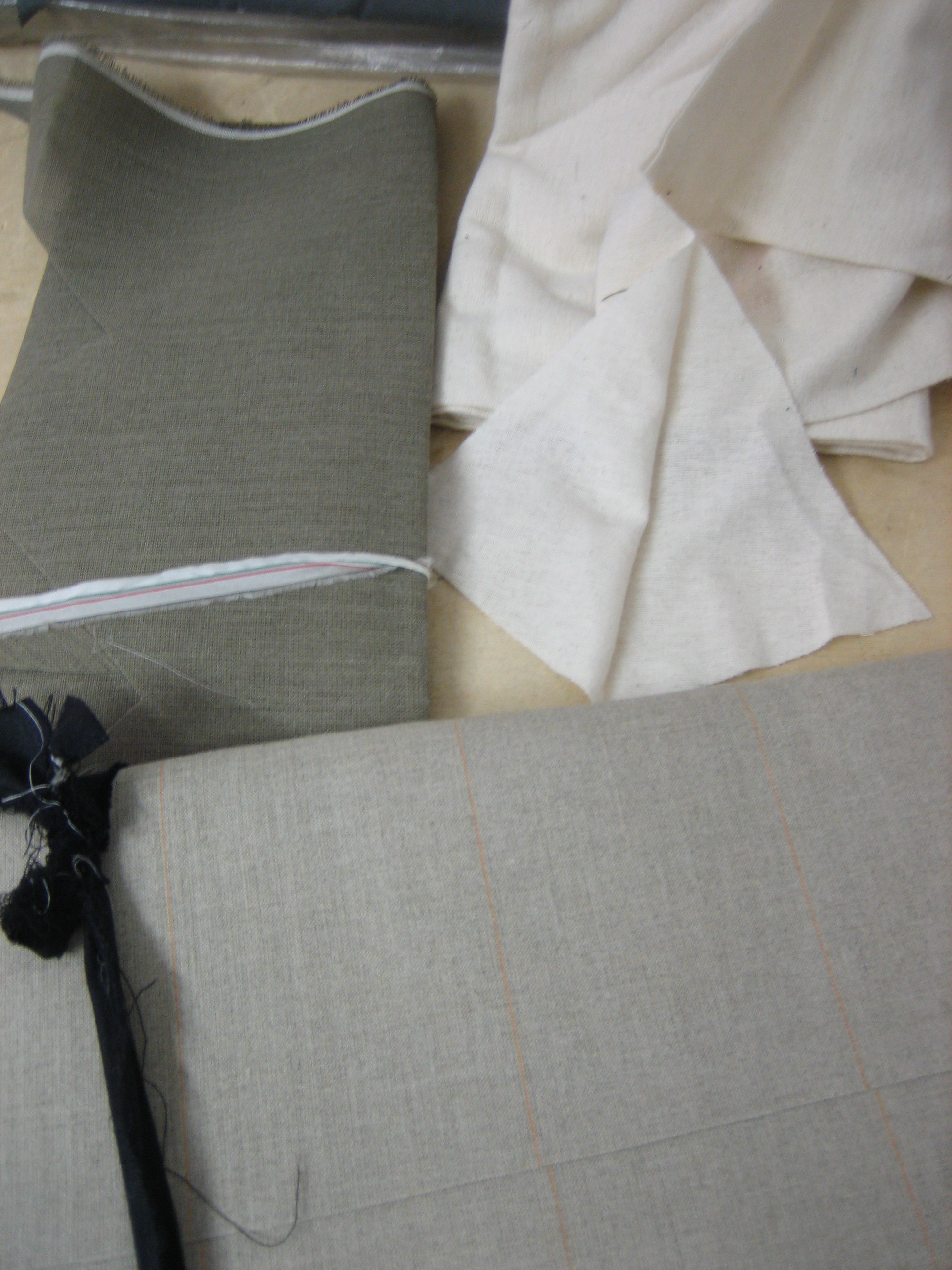 Materiali per interni giacca: canapina pelo cammello (in basso). ovattina per compimenti (in alto a destra) tela per colli (in alto a sinistra).